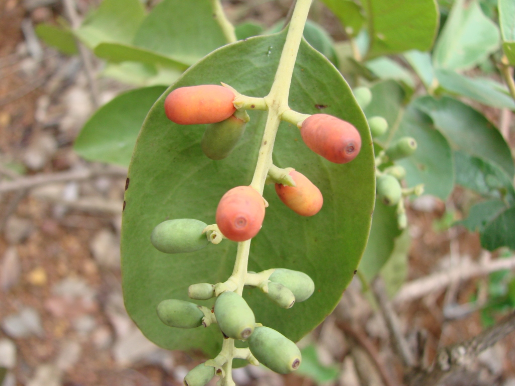 Phthirusa ovata - LORANTHACEAE Jardim Botânico - Brasília - Distrito Federal - Brasil.